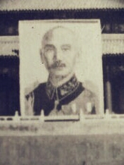 Chiang Kai Shek portrait on Tiananmen